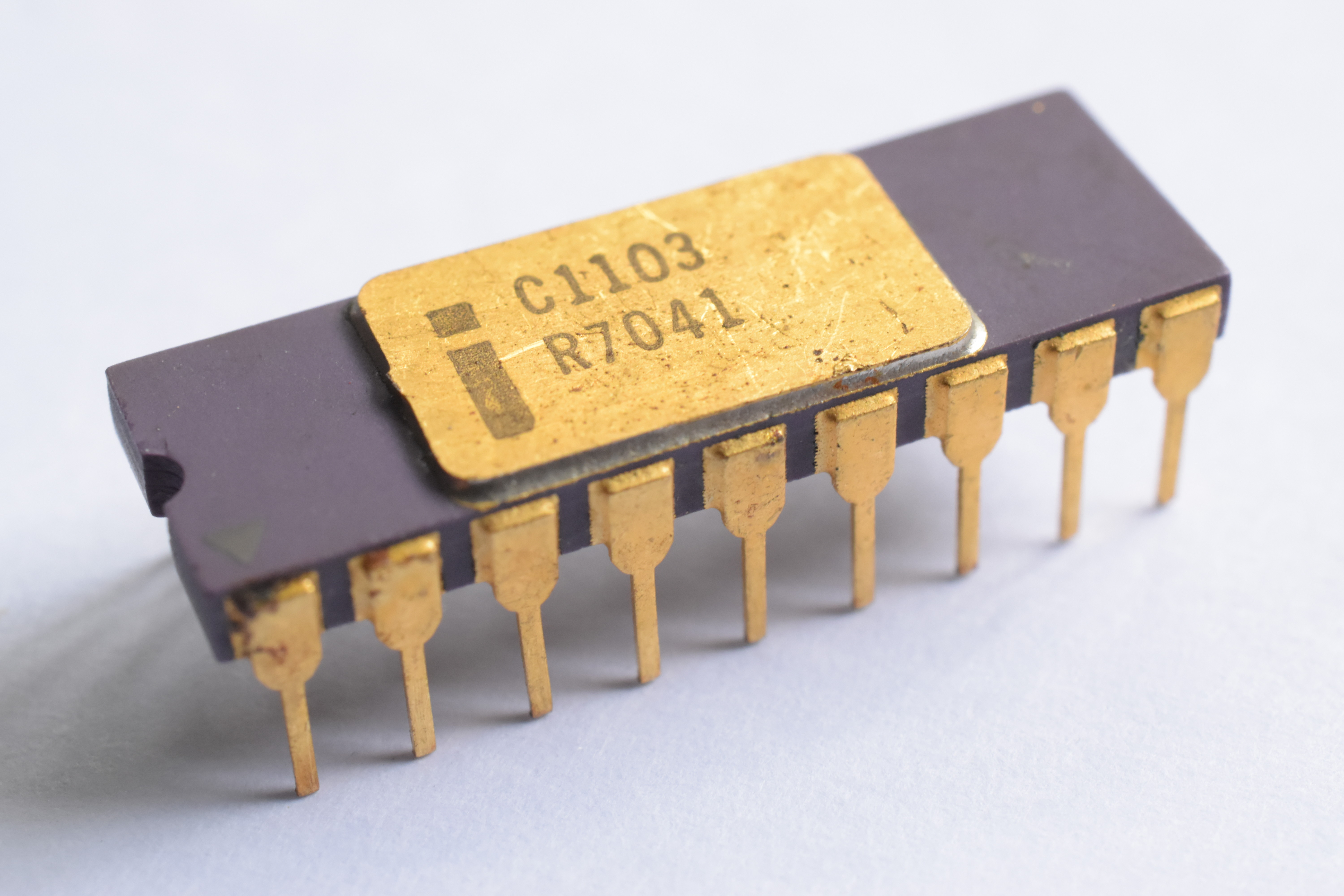 Intel C1103 DRAM memoro.